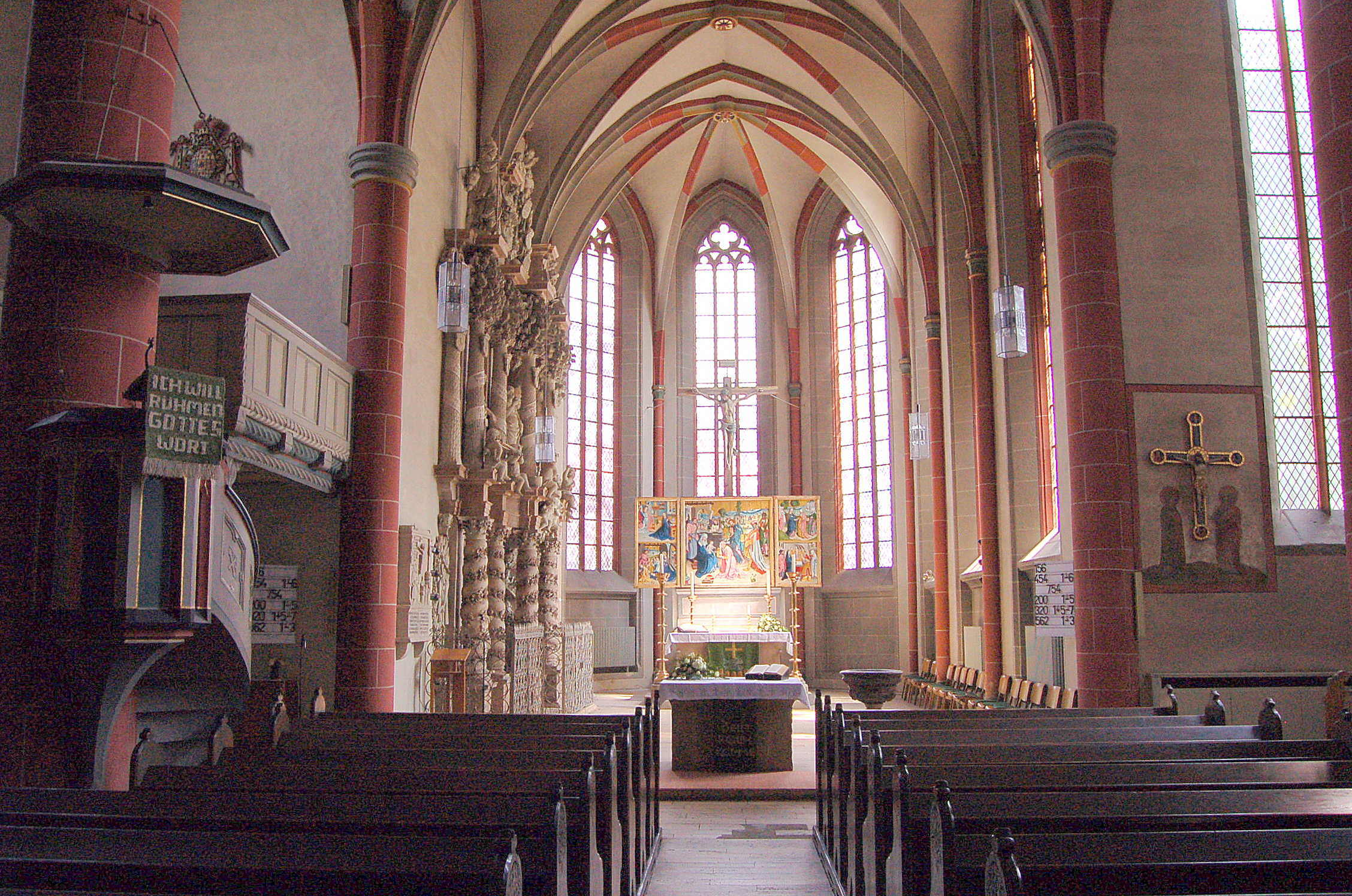 Innenraum der St.-Nikolai-Kirche, Korbach